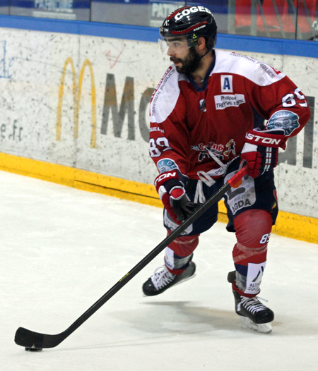 Toby Lafrance le 08/10/2013 lors du match de Coupe de la Ligue face à Briançon (Grenoble-Briançon: 8-2)